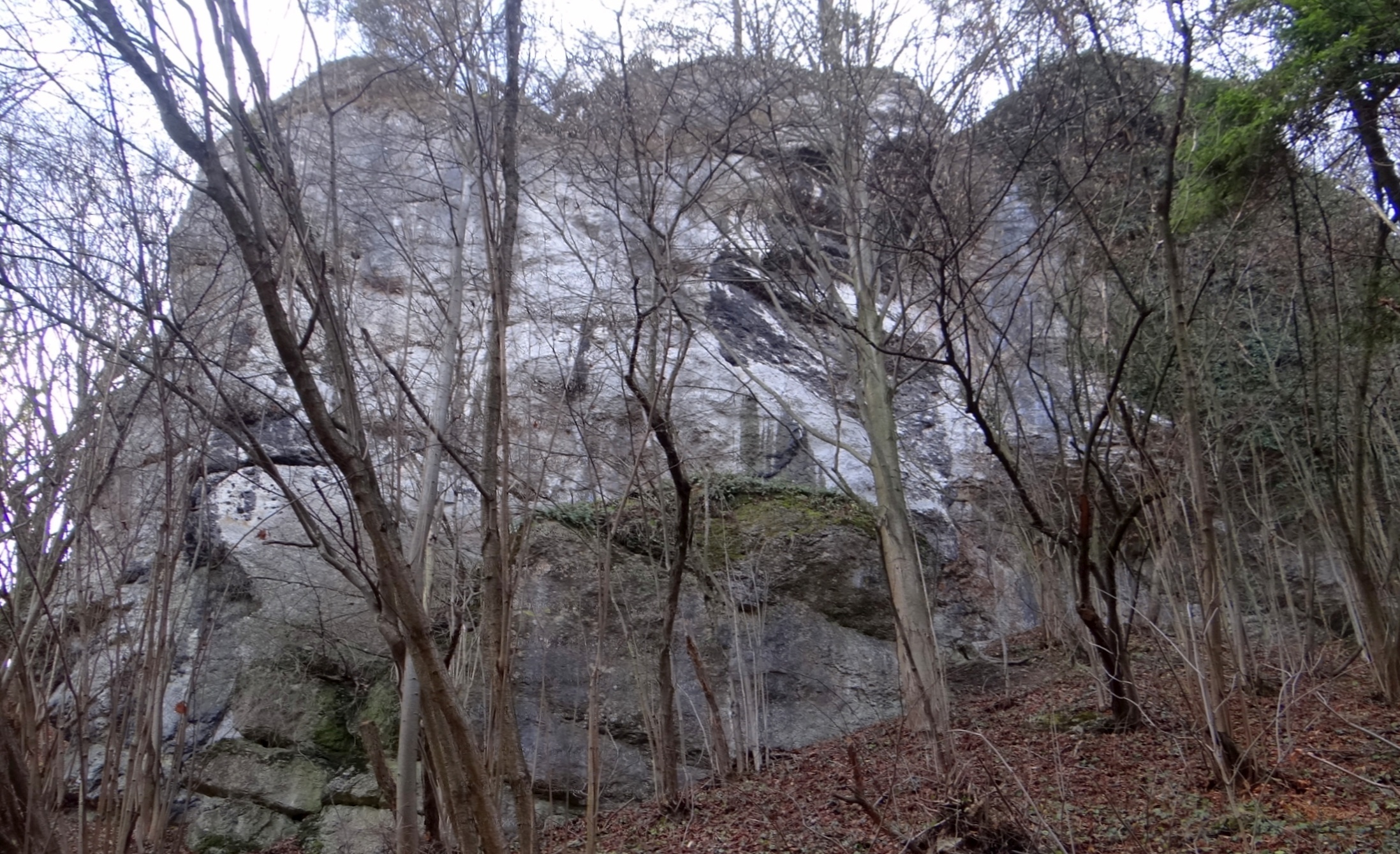 Wielka Zerwa w Zimnym Dole